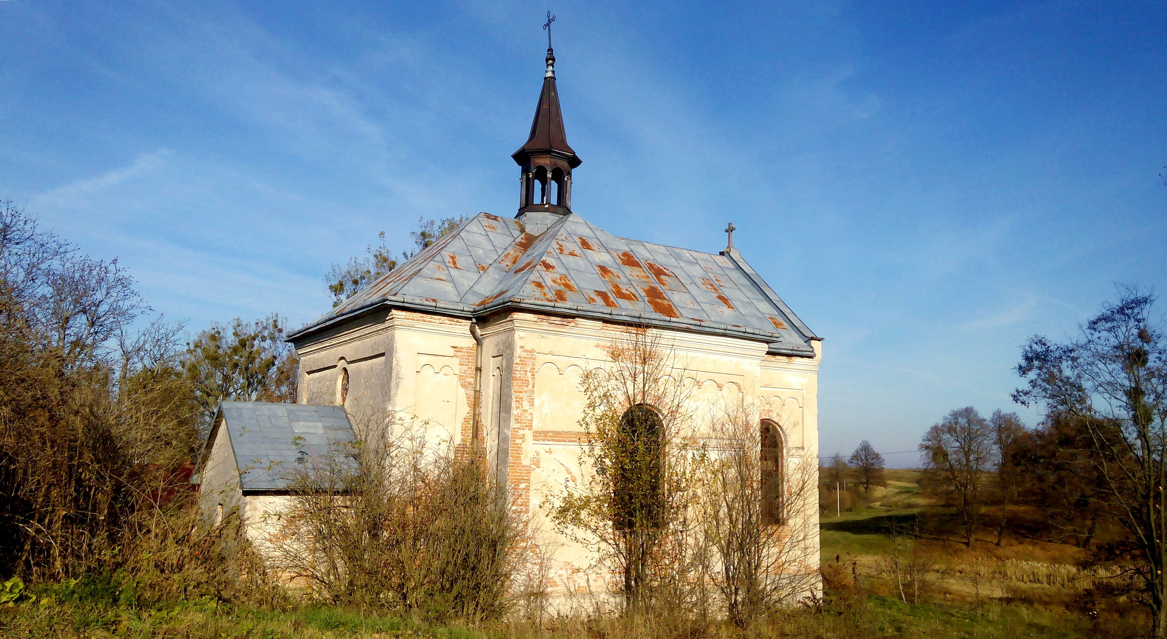 Костел-каплиця початку XX століття у с. Лісок, Буського району, Львівської області